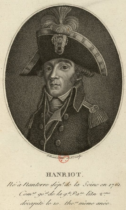 Hanriot né à Nanterre département de la Seine en 1761 Com.nt gé.al de la g.de Pa.ne l'An 2.eme décapité le 10 the.or même anée (estampe)